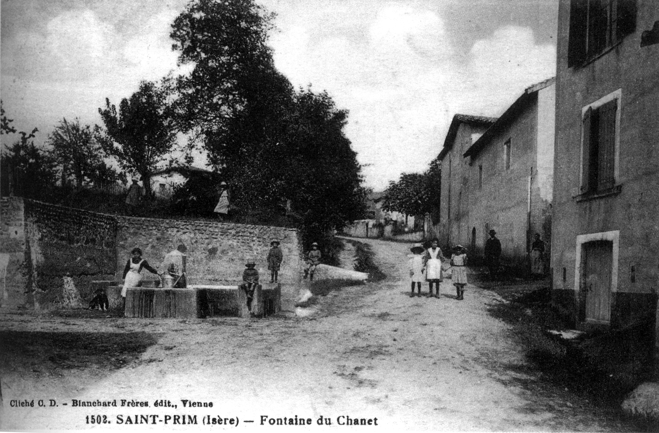 Saint-Prim, fontaine du Chanet, 1906